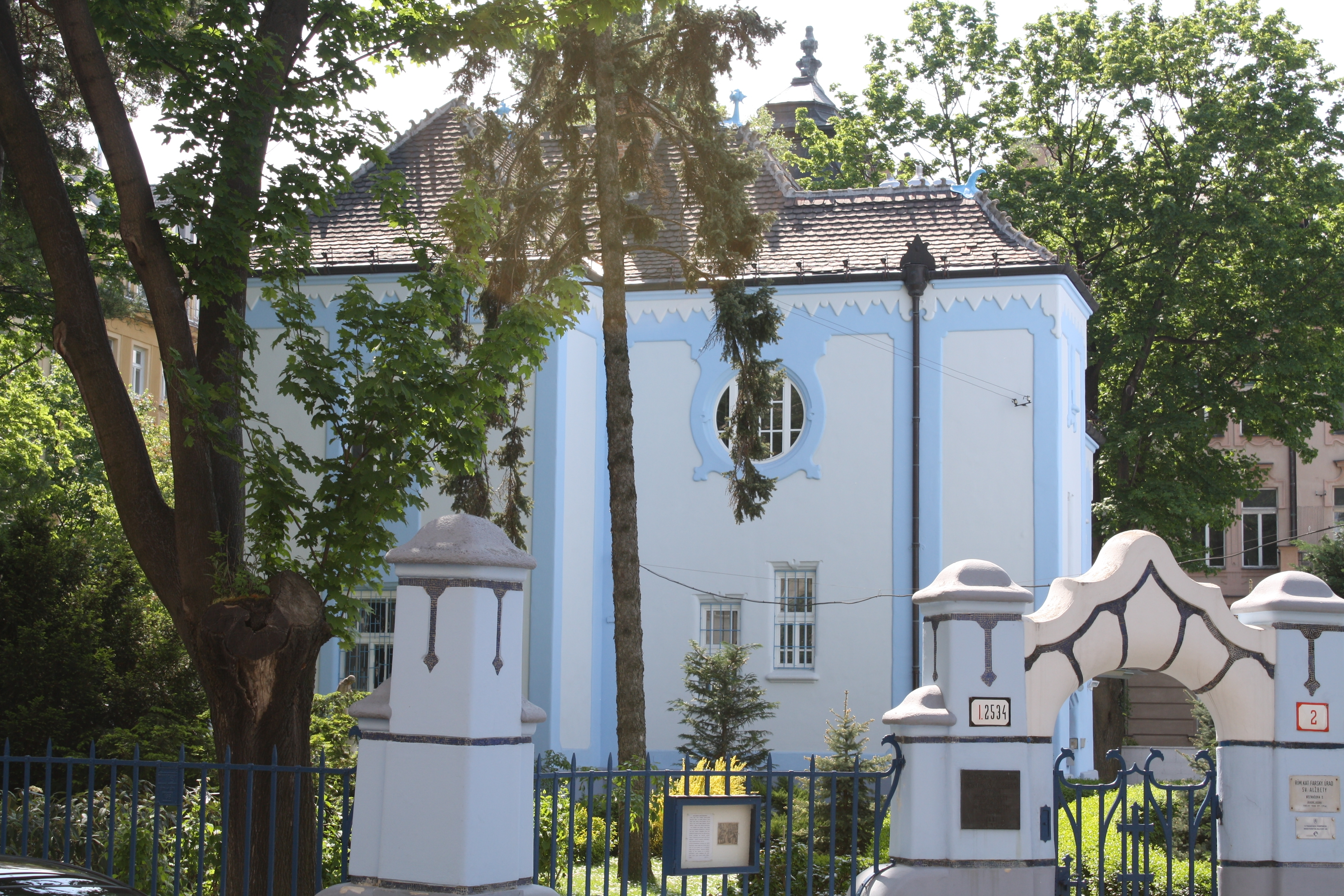 Kirche St. Elisabeth (Blaue Kirche) in Bratislava